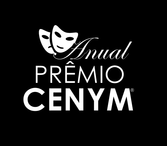 Logo oficial do Prêmio Cenym